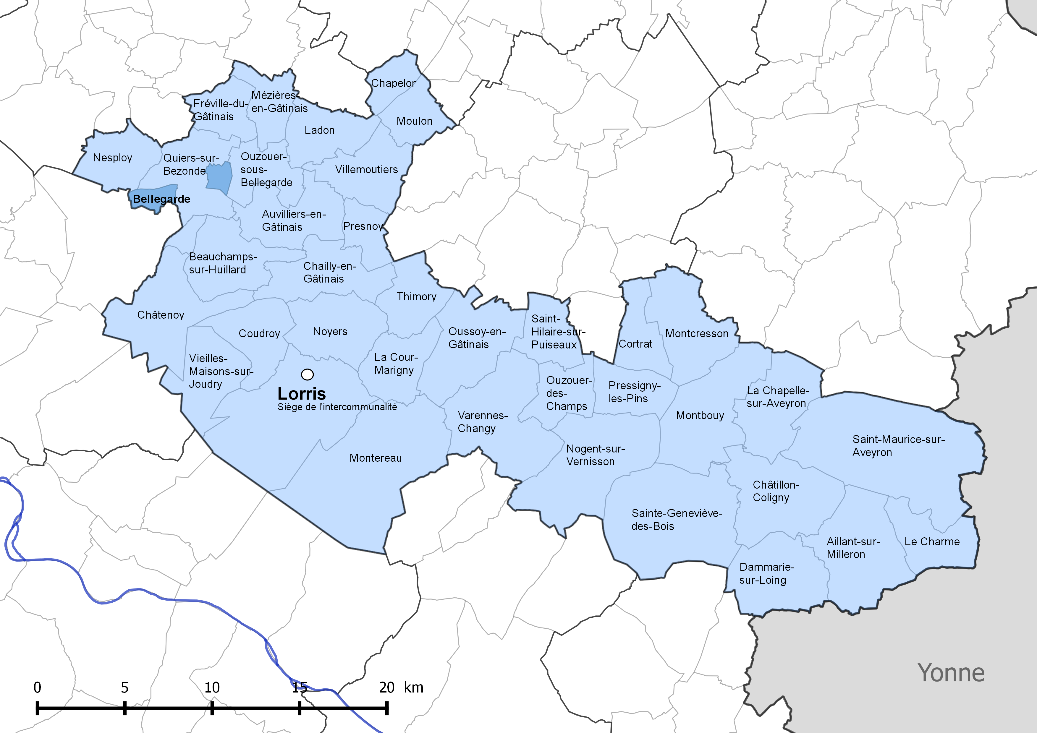 Périmètre de la communauté de communes Canaux et forêts en Gâtinais - Situation de la commune de Bellegarde (Loiret)